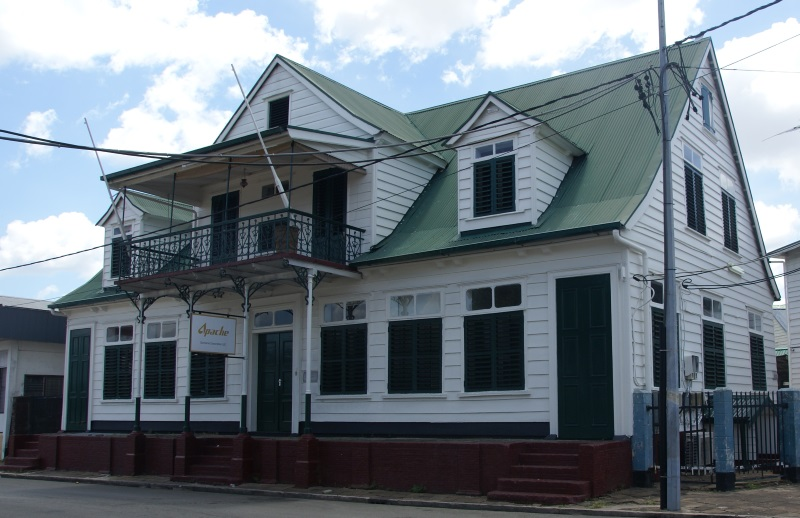 Kromme Elleboogstraat 9-11, Paramaribo, Suriname